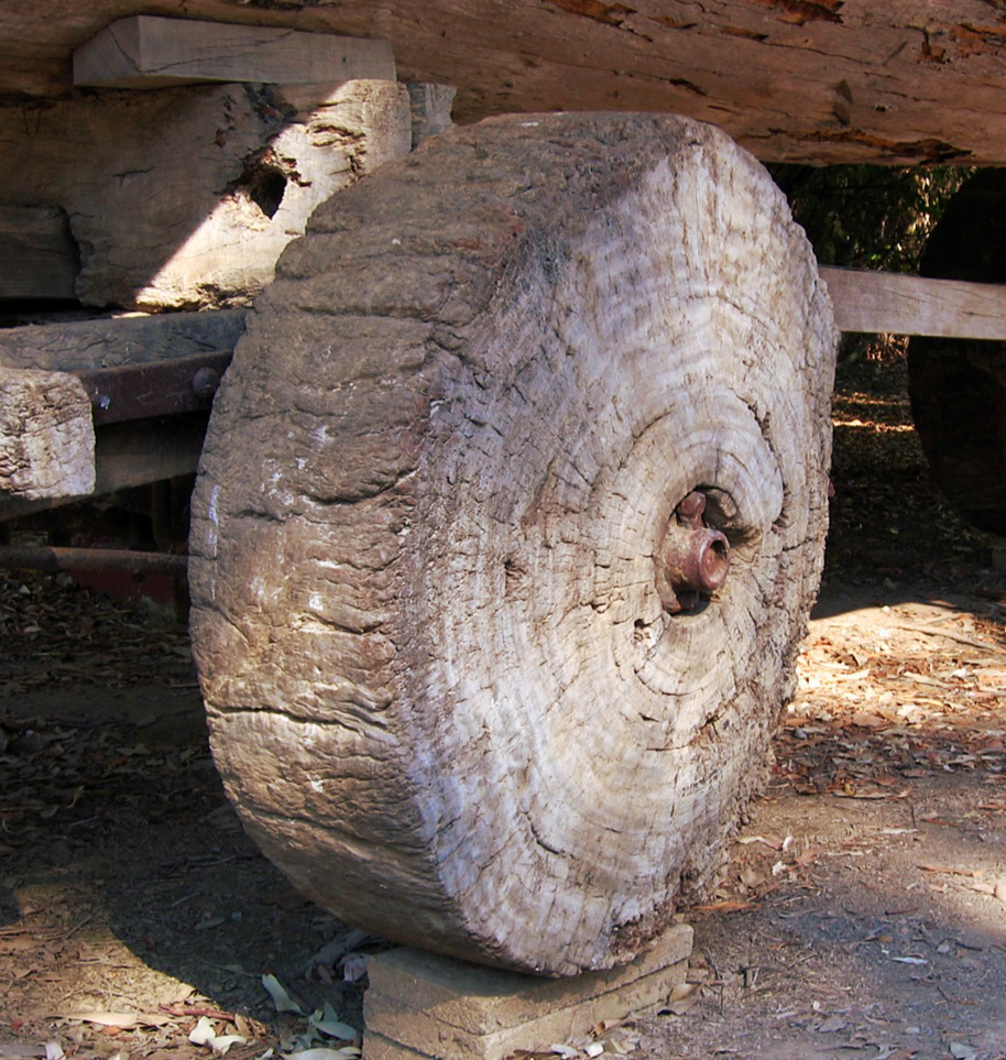 Roue ancienne, en bois brut.